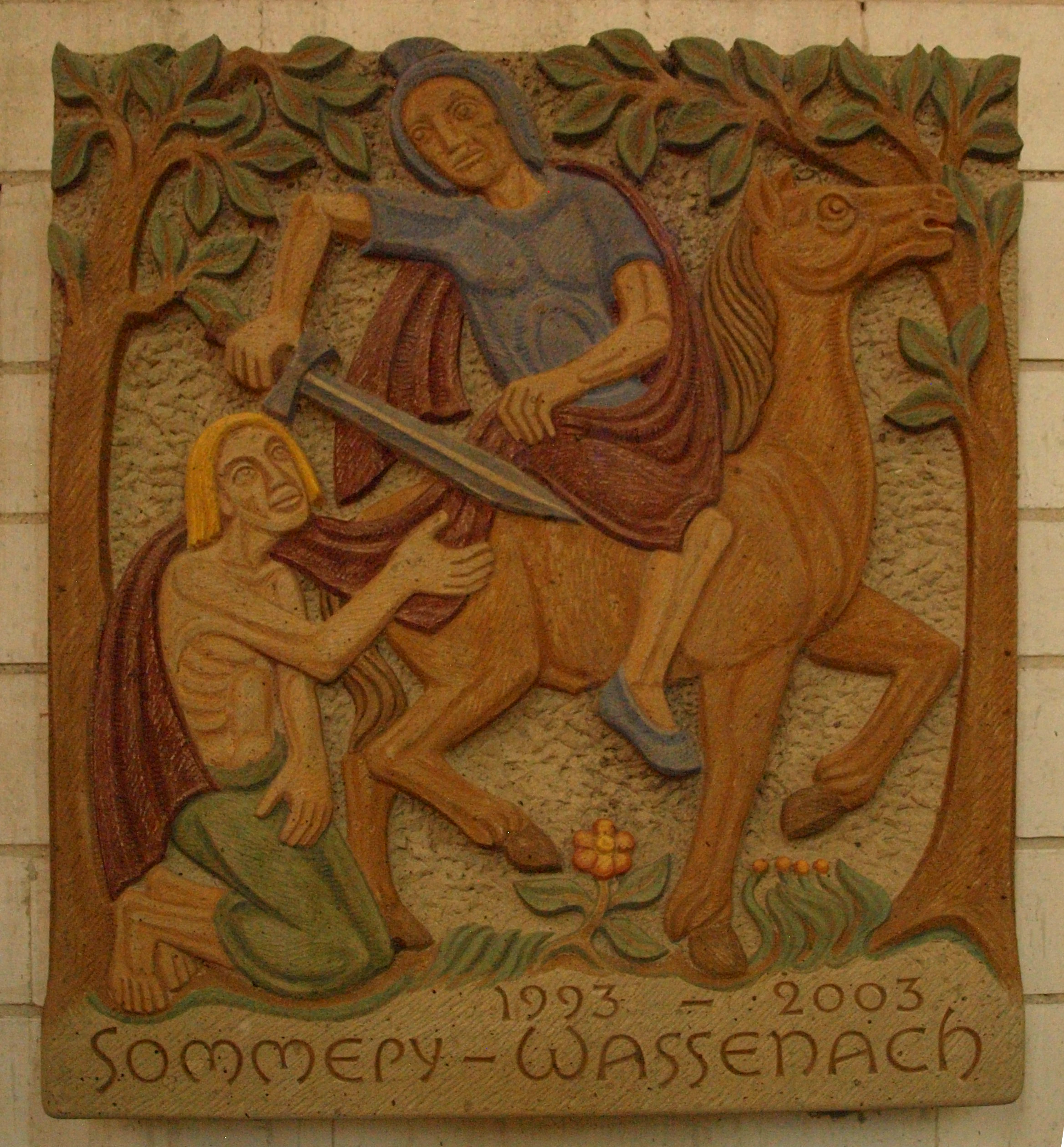 Église Saint-Martin de Sommepy-Tahure (Marne, France), plaque commémorative du jumelage entre Sommepy-Tahure et Wassenach